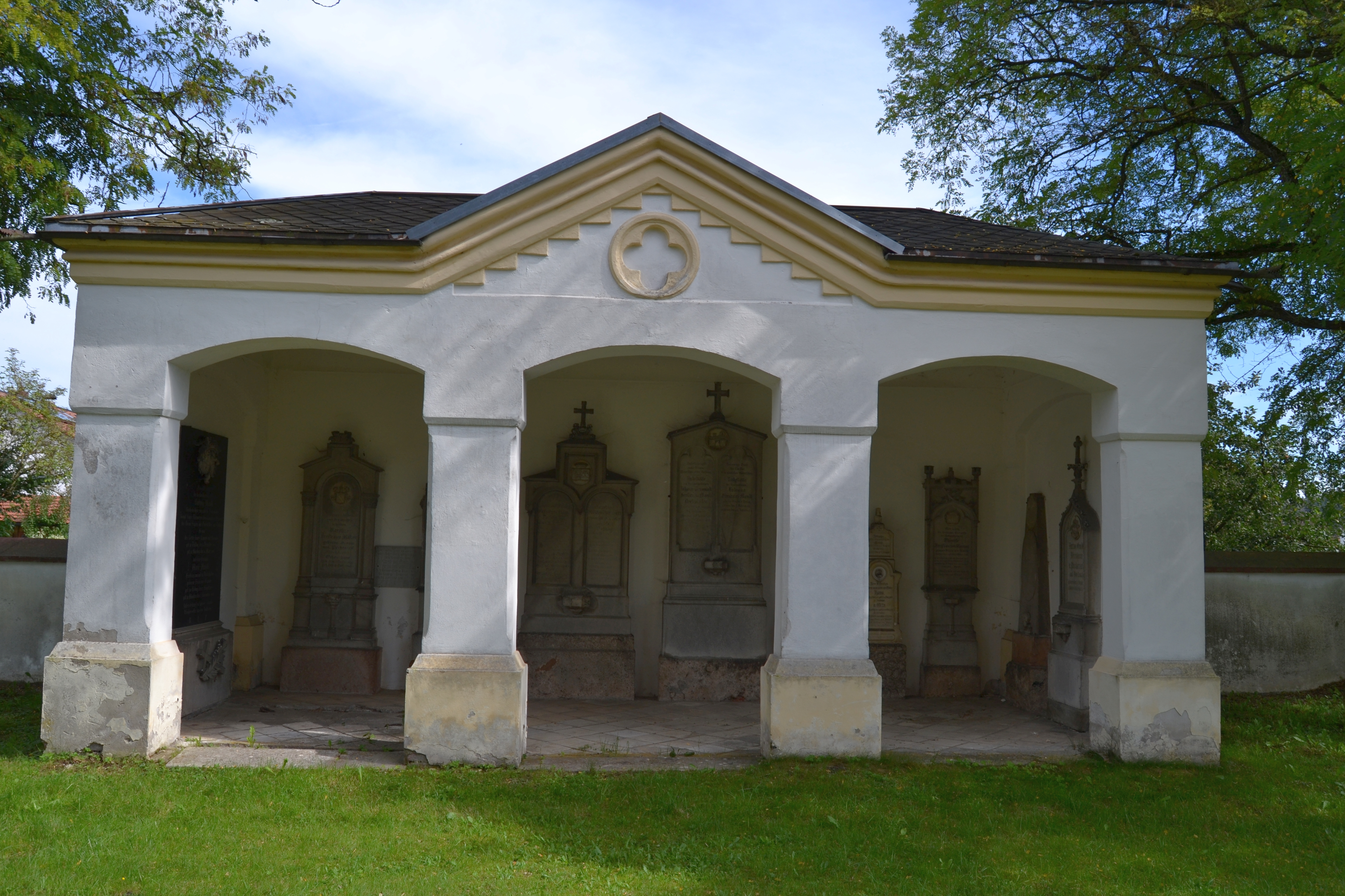 Grufthalle der Tüßlinger Schlossbesitzer, um Mitte 19. Jahrhundert; auf dem Grund der Katholische Wallfahrtskirche Unschuldige Kindlein in Heiligenstatt (zu Tüßling).This is a photograph of an architectural monument.